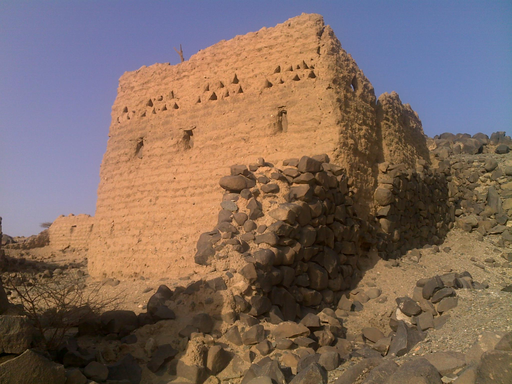 صورة لأحد حجرات قلعة قبيلة البدارا (قلعة شنقل) في قرية اللبط في تربة البقوم.